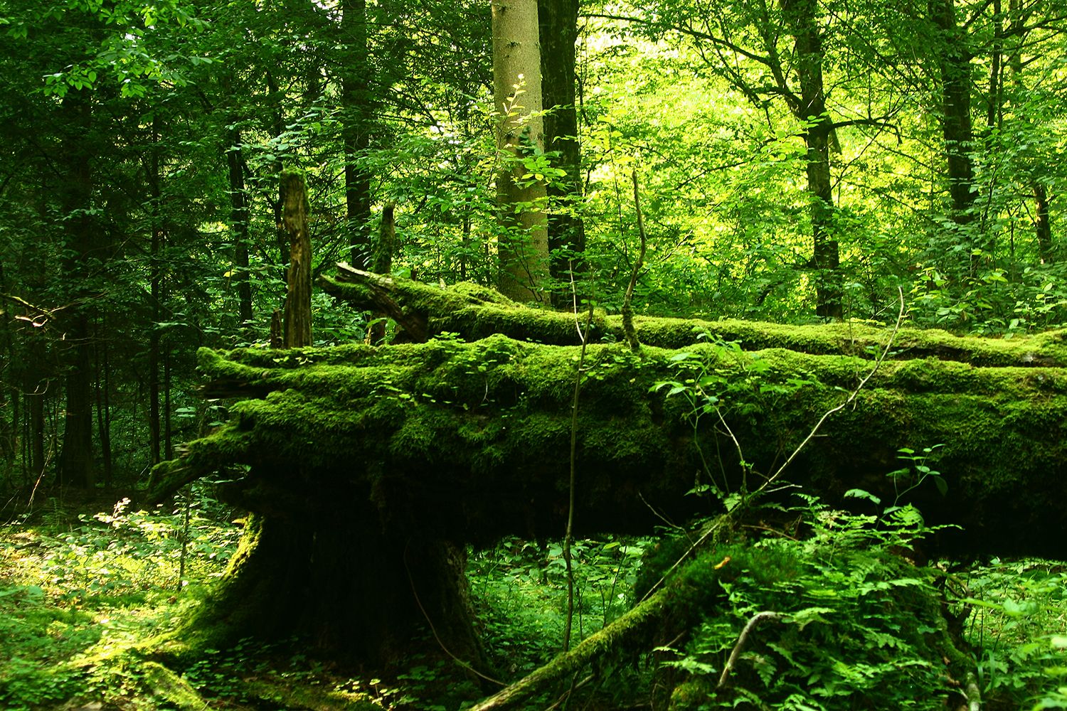 Specjalny obszar ochrony siedlisk Puszcza Białowieska. This is a photography of Natura 2000 protected area with ID PLC200004